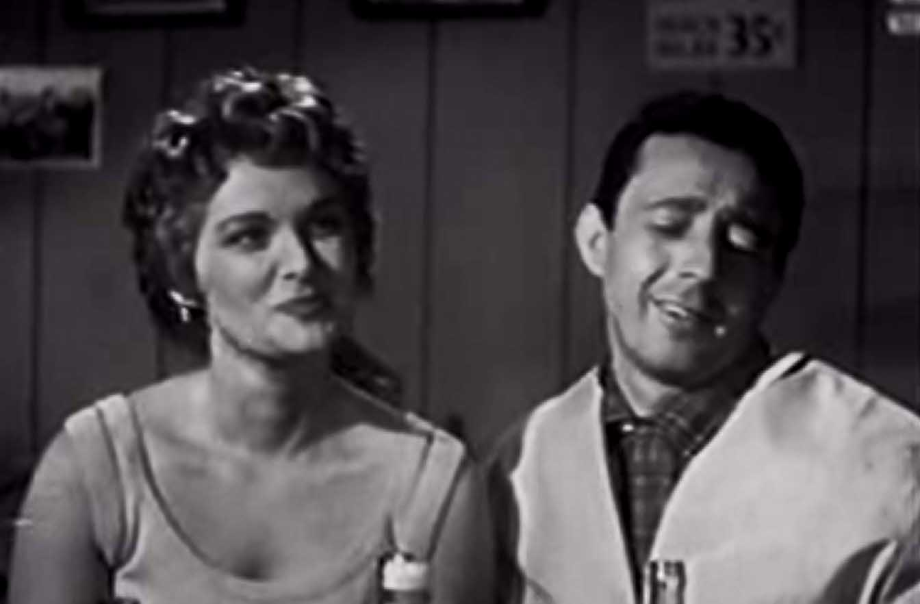 Roxanne Arlen and Eddie Ryder (1956), in “Hot Rod Girl”